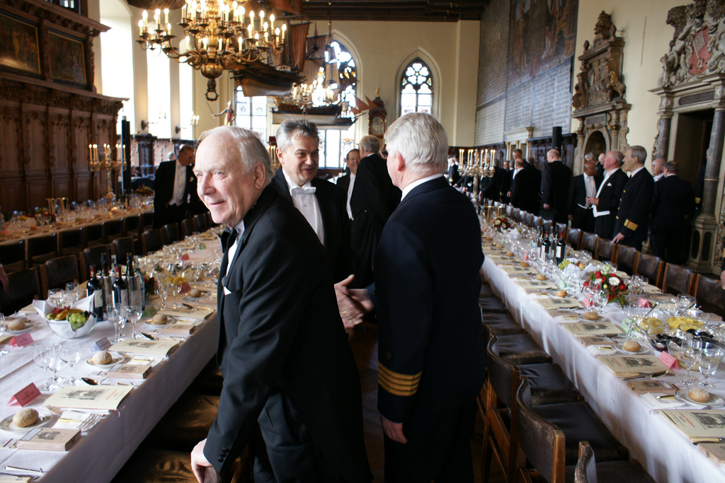 „Stimmungsbild“ von der 465. Schaffermahlzeit 2009 von Haus Seefahrt in der Oberen Rathaushalle des historischen Rathauses in Bremen, Deutschland: Kurz vor dem Festessen.